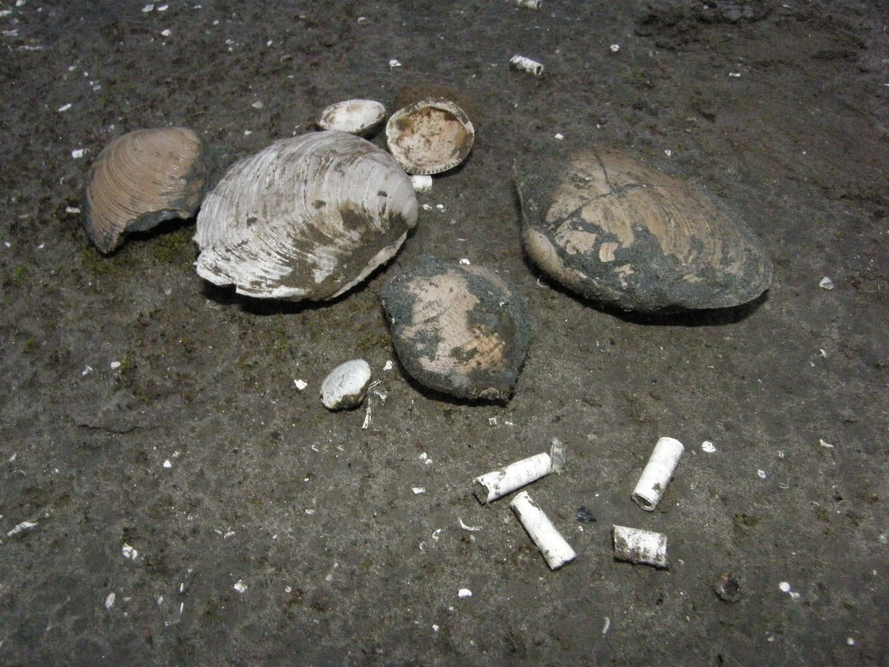 Omma Formation saigawa omma-kaigarabashi 大桑層 撮影：松岡明芳